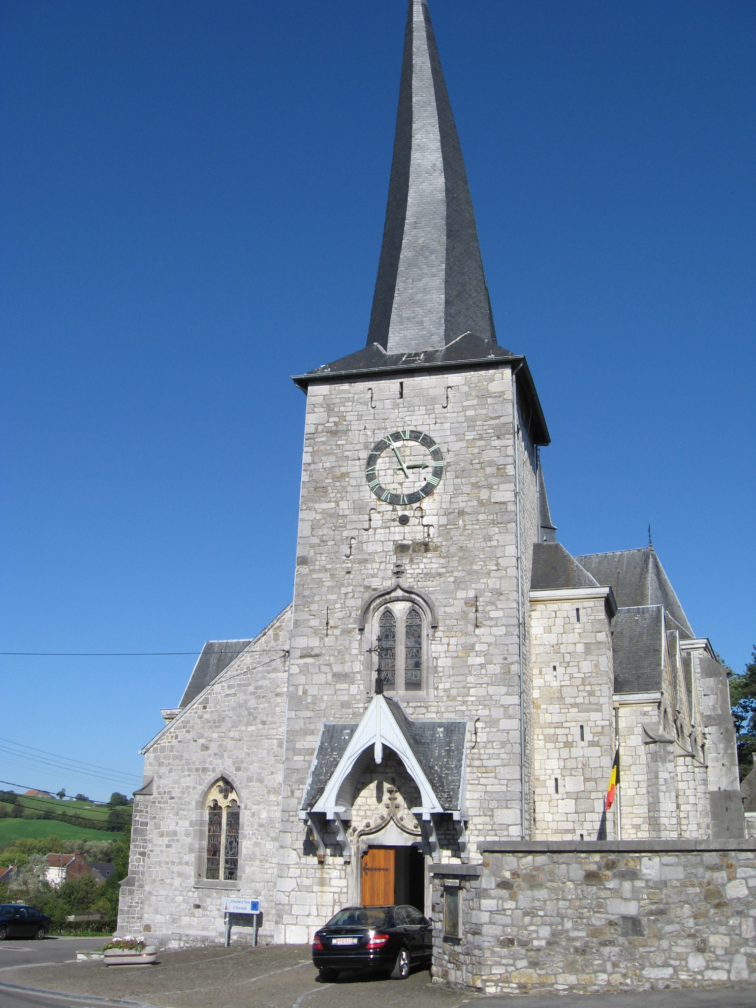 Sint-Lambertuskerk in Gulke